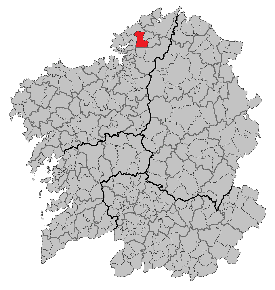 Mapa coa localización do concello de San Sadurniño.